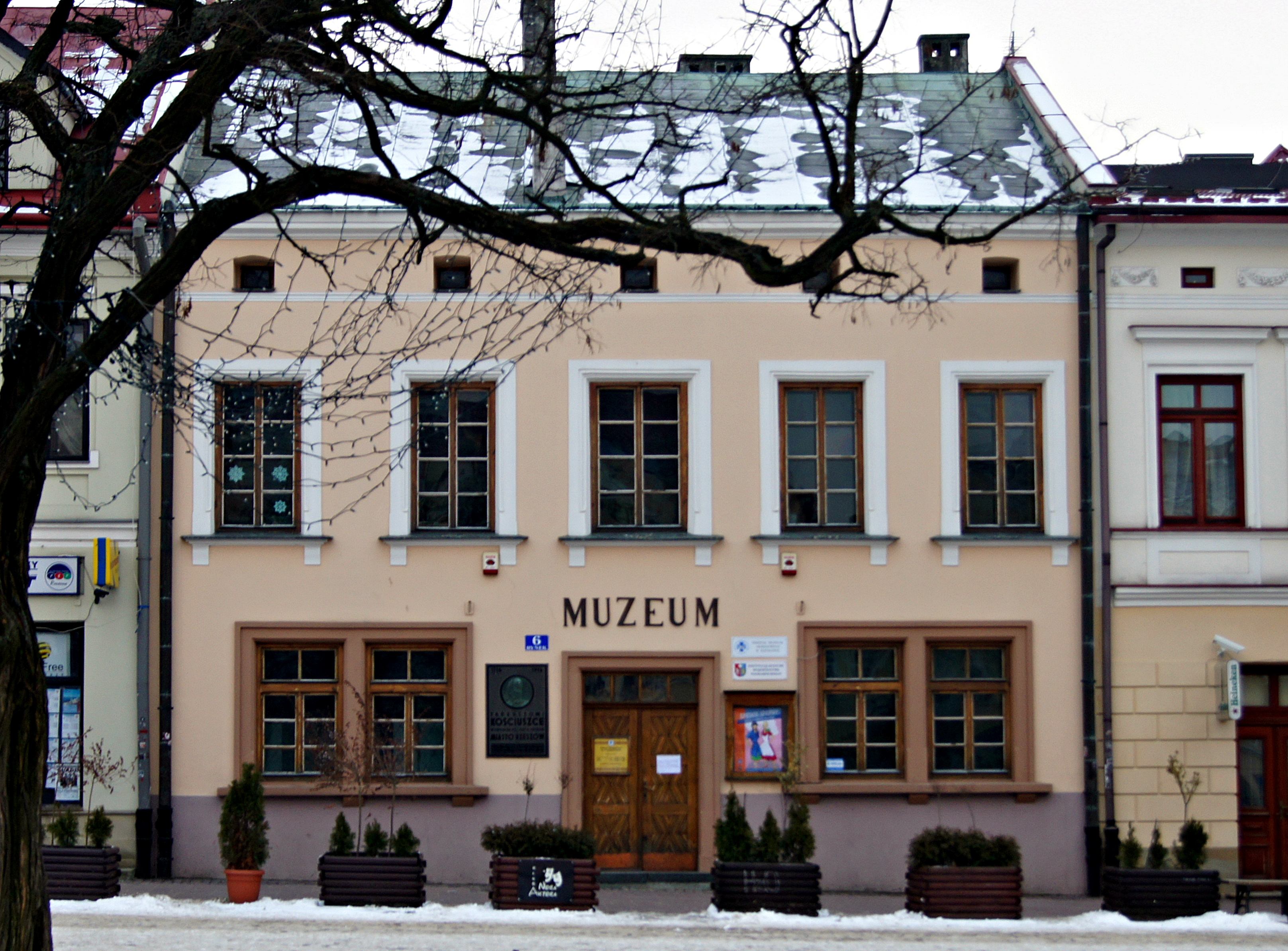 Muzeum Etnograficzne im. F. Kotuli w Rzeszowie, Rynek